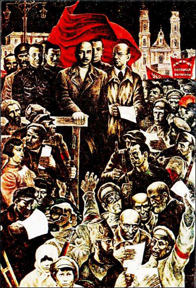 Карціна Дударэнкі "Менск1919 год", прысьвечаная абвяшчэньнью БССР